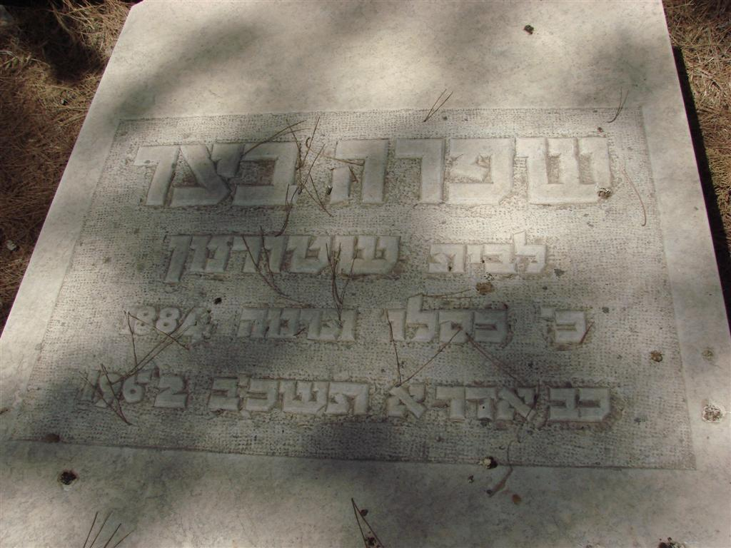 שפרה בצר שטורמן